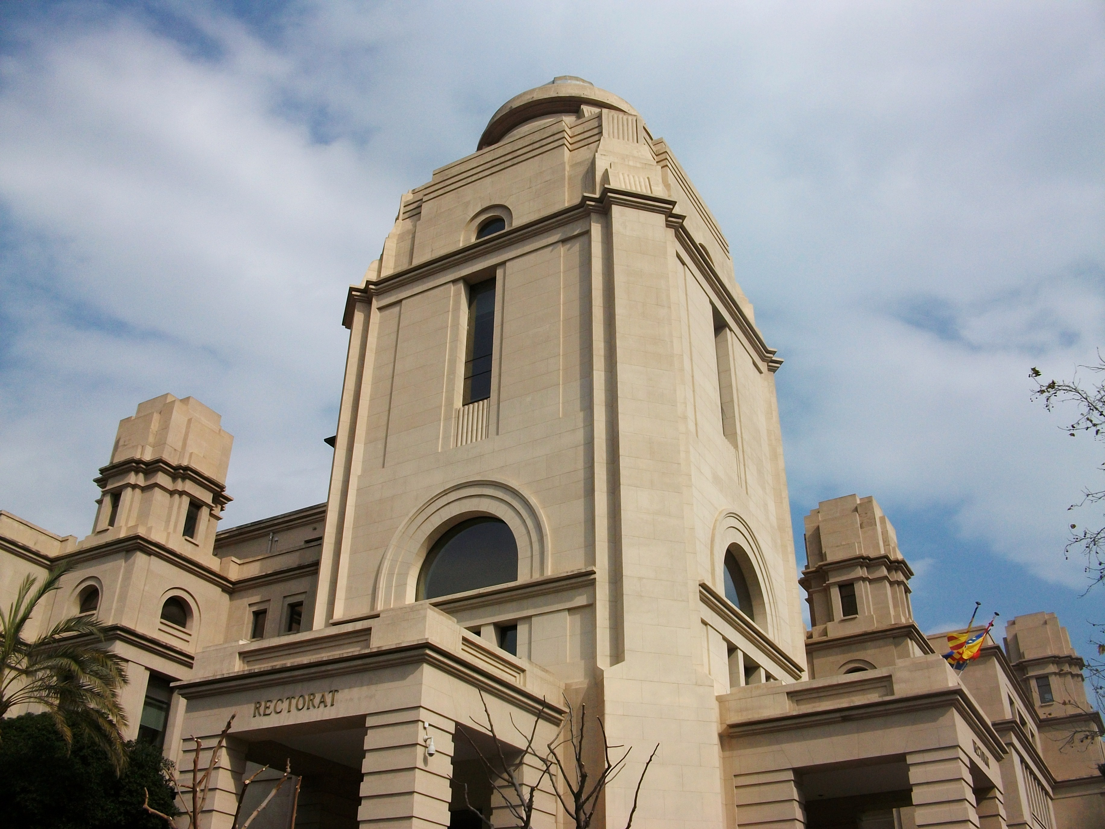 Edifici del Rectorat de la Universitat de València.